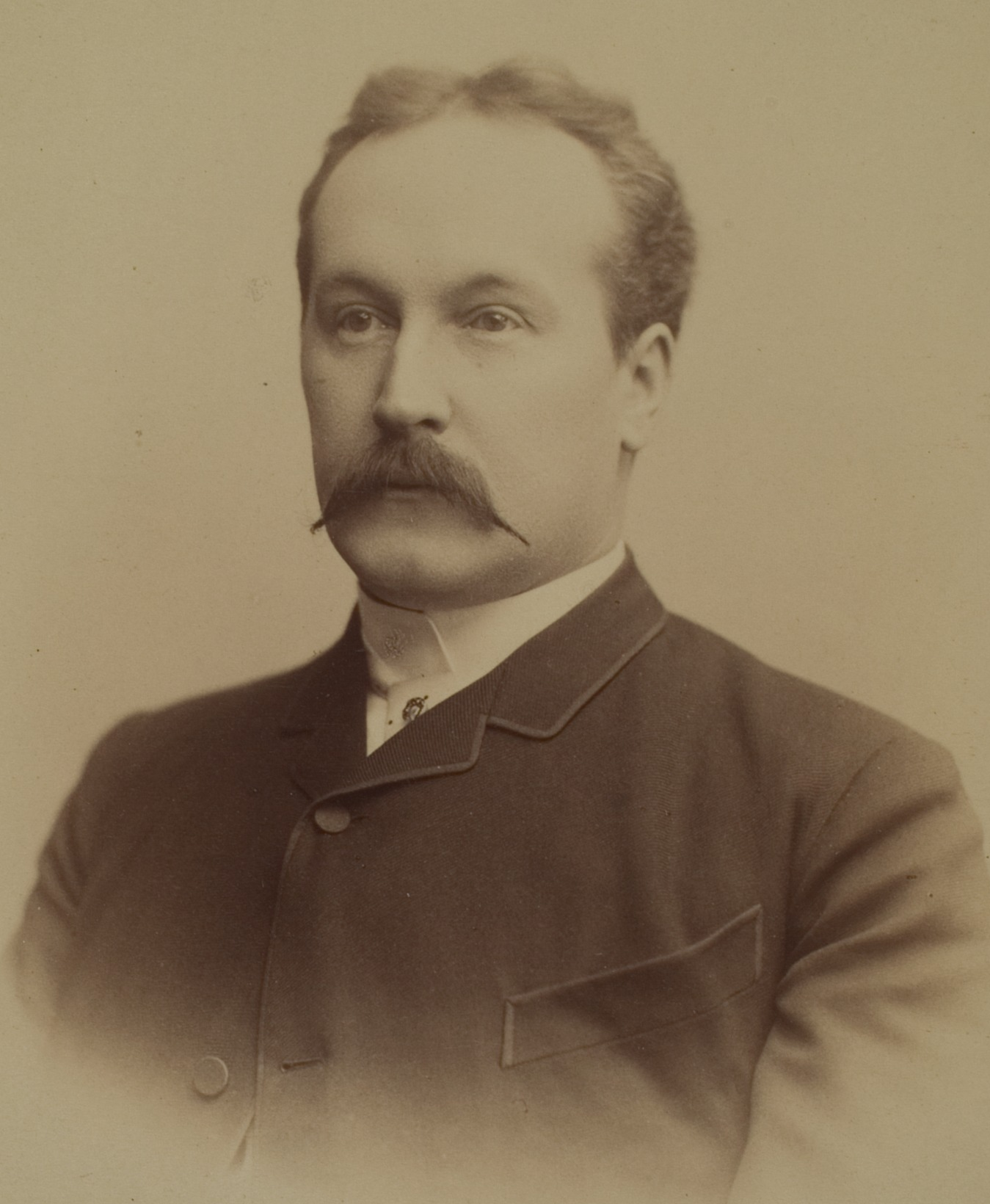 Wilhelm Friedrich Theodor Adolph von Oechelhäuser, Kunsthistoriker, 1890–1893 Professor in Heidelberg